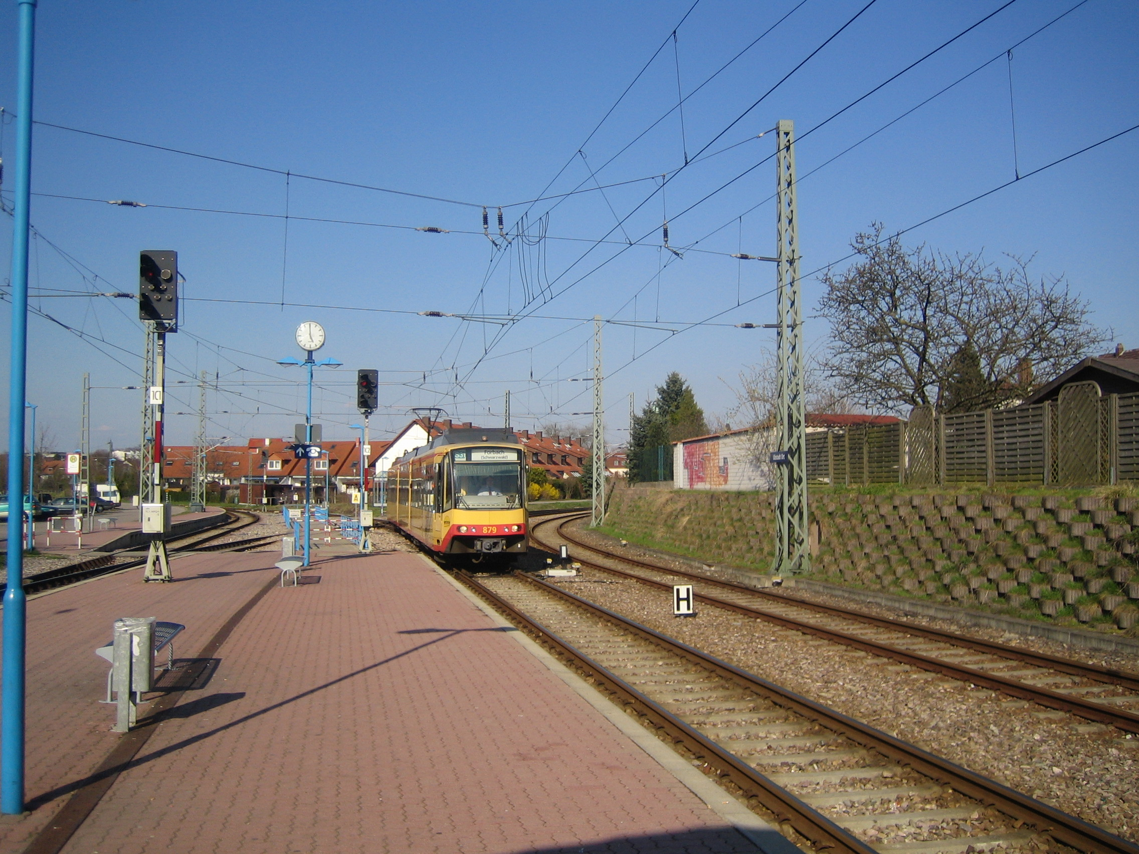 S31 im Bf. "Ubstadt Ort", selbst fotografiert